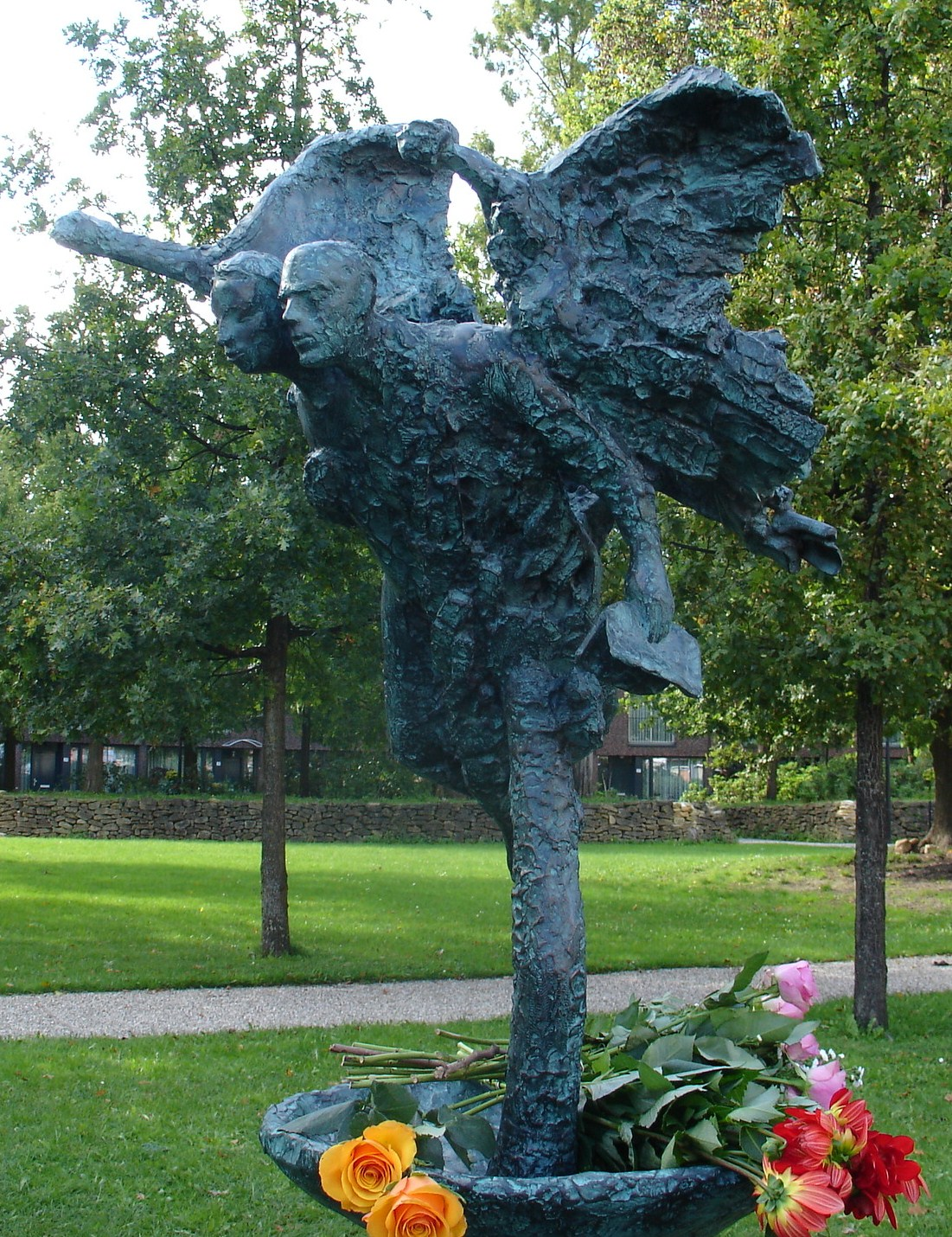 Monument voor de liefde tussen Osip en Nadezjda Mandelstam. Kunstenaars Hanneke de Munck en Chatsjatoer Bjely naar een ontwerp van Hanneke de Munck, Sietse Bakker en Chatsjatoer Bjely. 2015, in de Nadezjda Mandelstamstraat in Amsterdam-Zuidoost